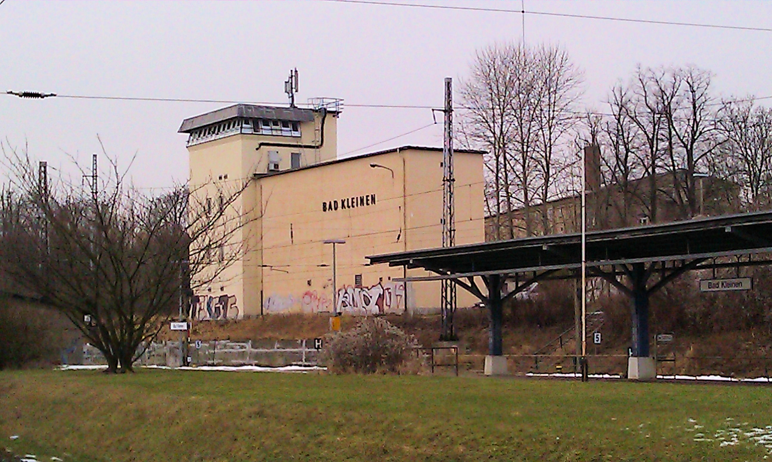 Bahnhof Bad Kleinen, Mecklenburg-Vorpommern